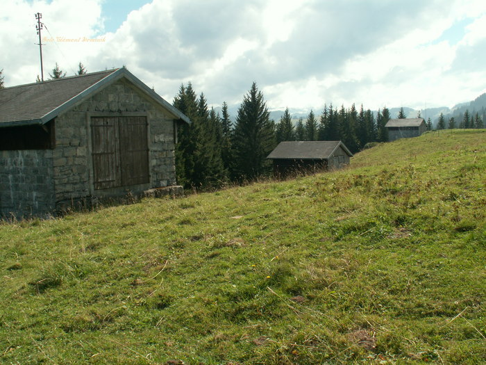 Drei Bunker der Stellung Jaunpass